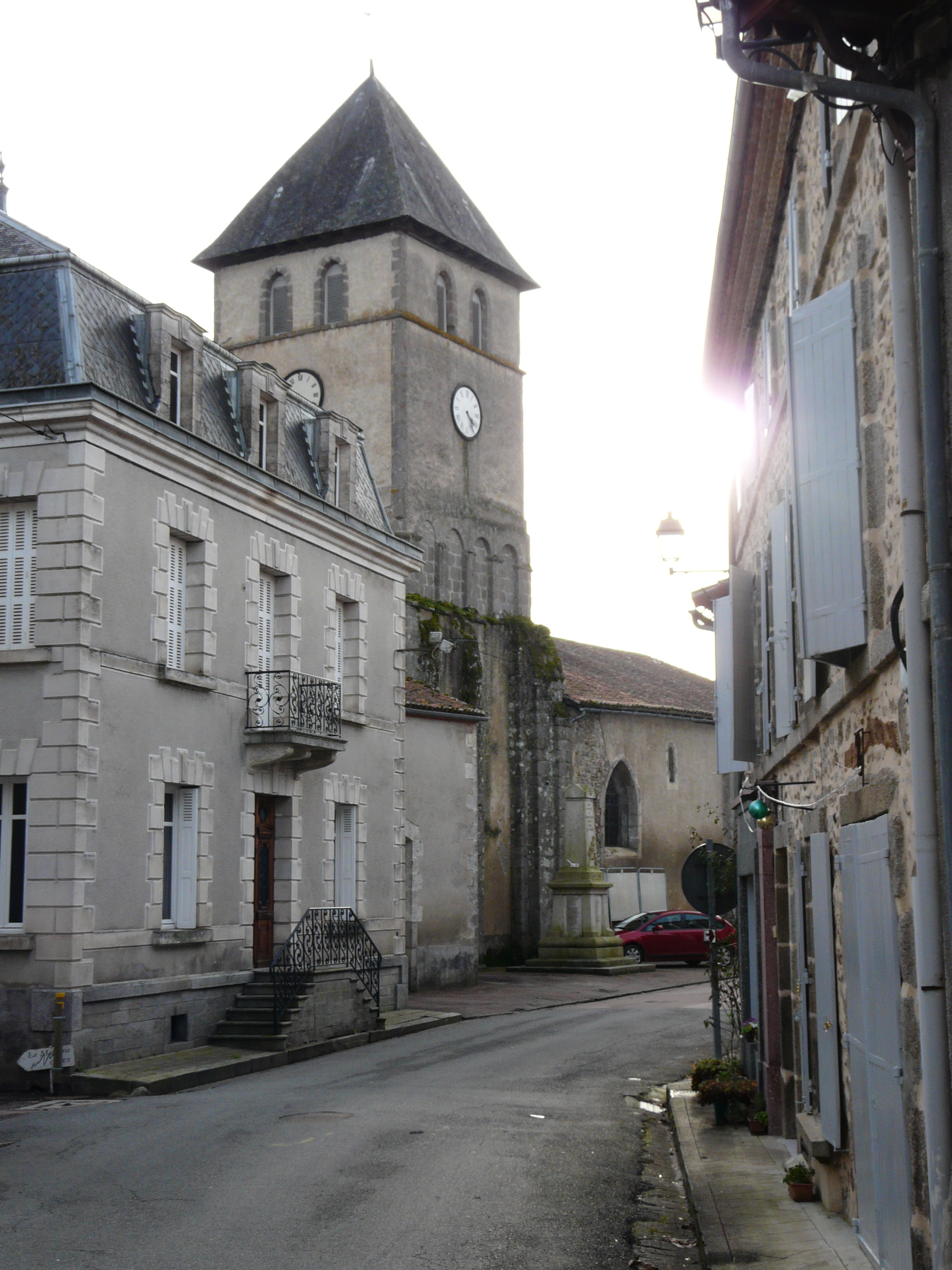 La rue principale du village de Busserolles, Dordogne, France.